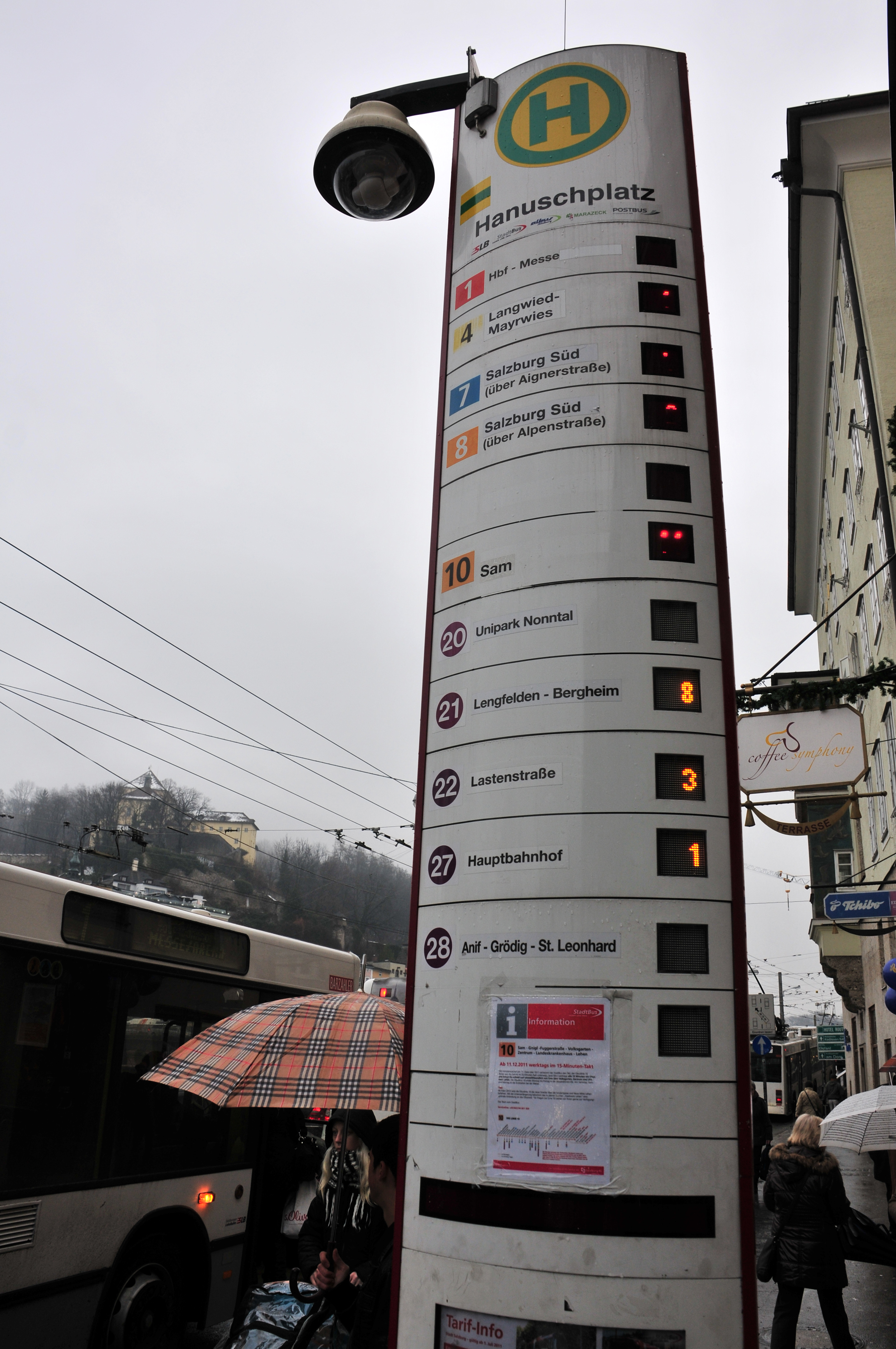 Oberleitungsbus Salzburg